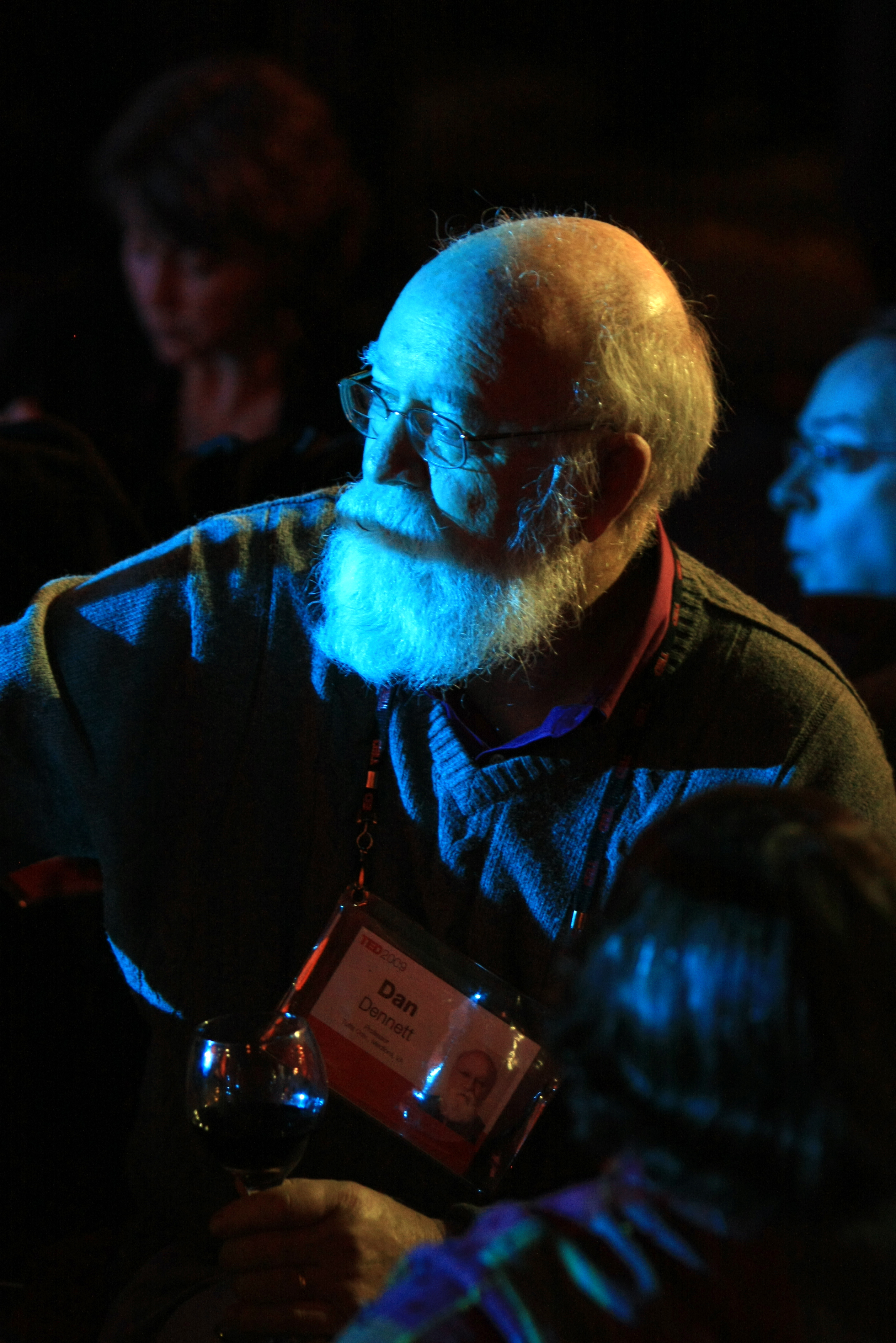 Dan Dennett looks on at TED 2009.